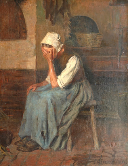 Peinture à l'huile de Jean de FRANCQUEVILLE